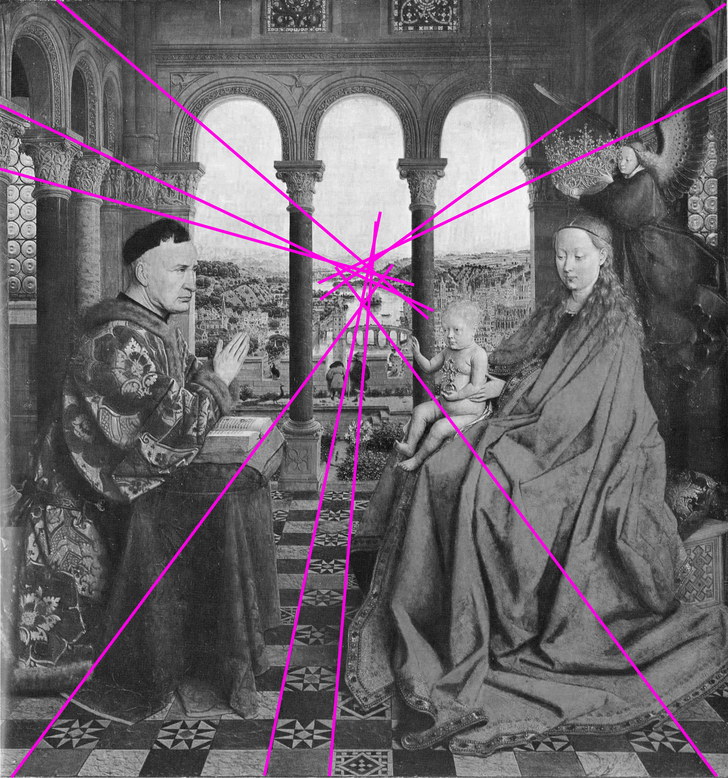 La prolongation des lignes de fuites montre que le tableau n'est pas construit suivant les règles de la perspective énoncées par Alberti la même année en Italie. L'effet illusionniste de profondeur réalisé par Van Eyck résulte donc d'une construction empirique de l'espace.